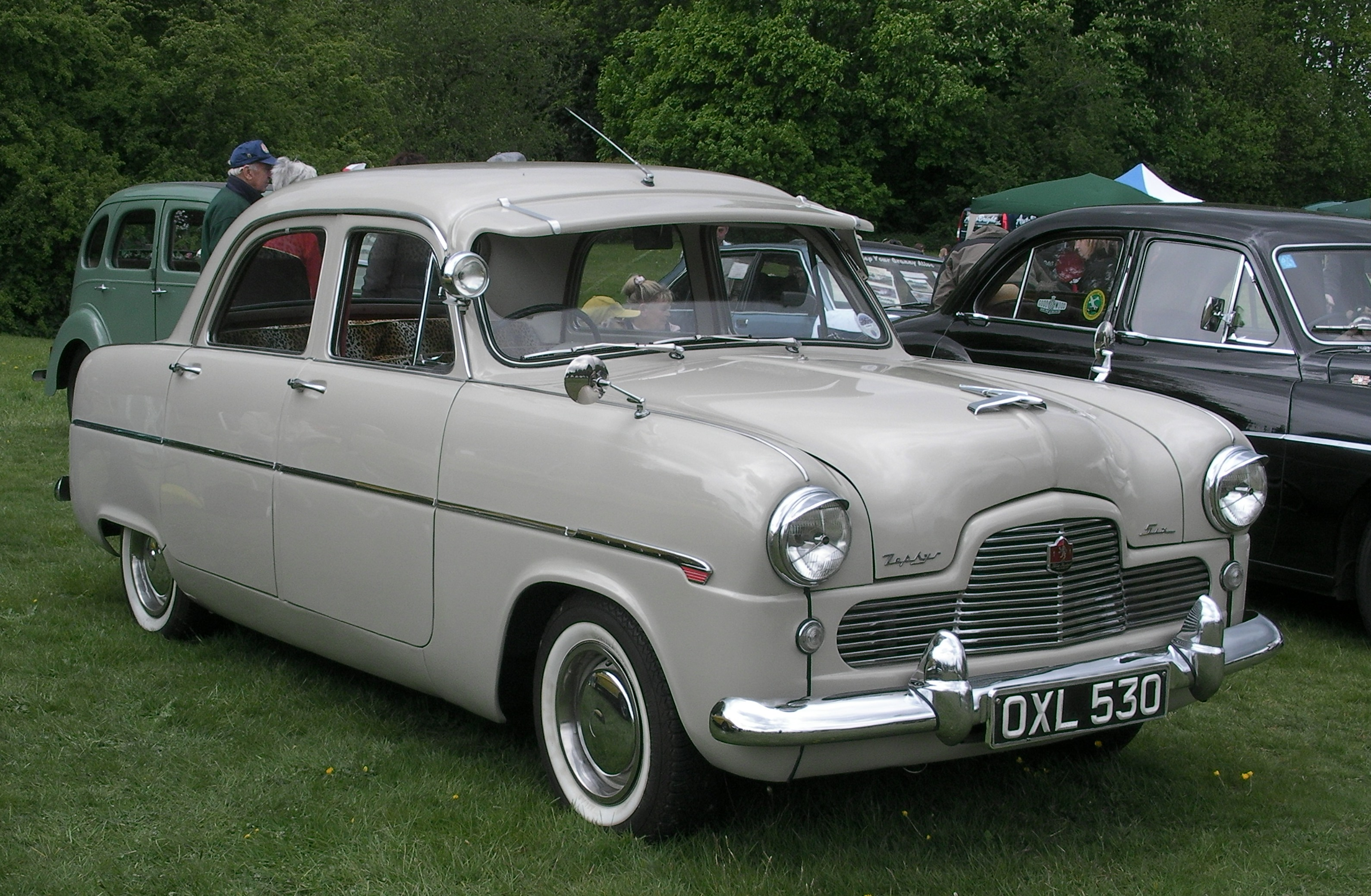 Ford Zephyr Six